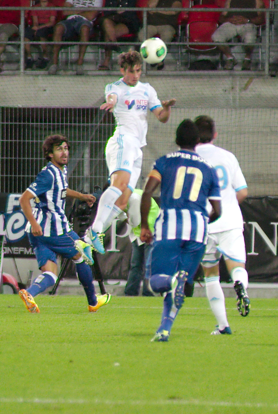 Valais Cup 2013 - OM-FC Porto - 20130713 - Tête de Baptiste Aloé